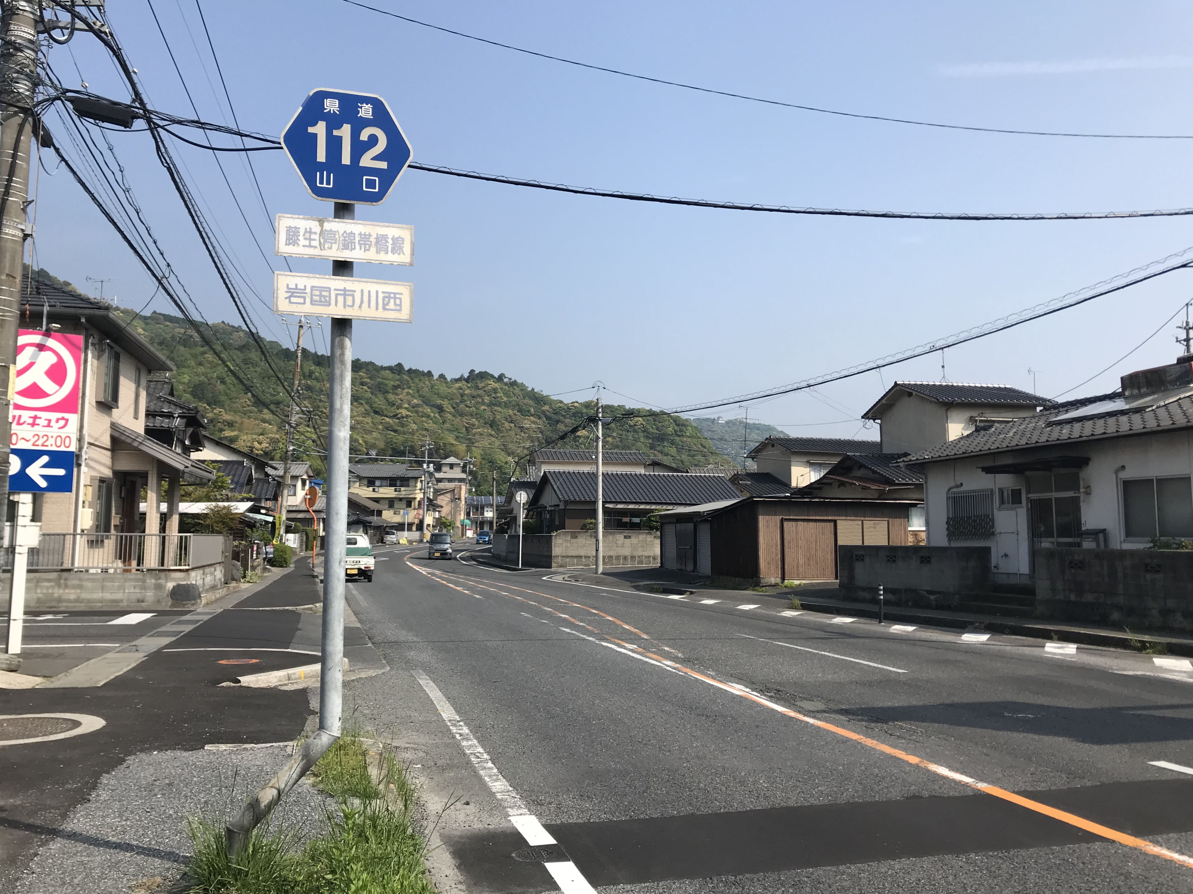 川西駅付近の山口県道112号